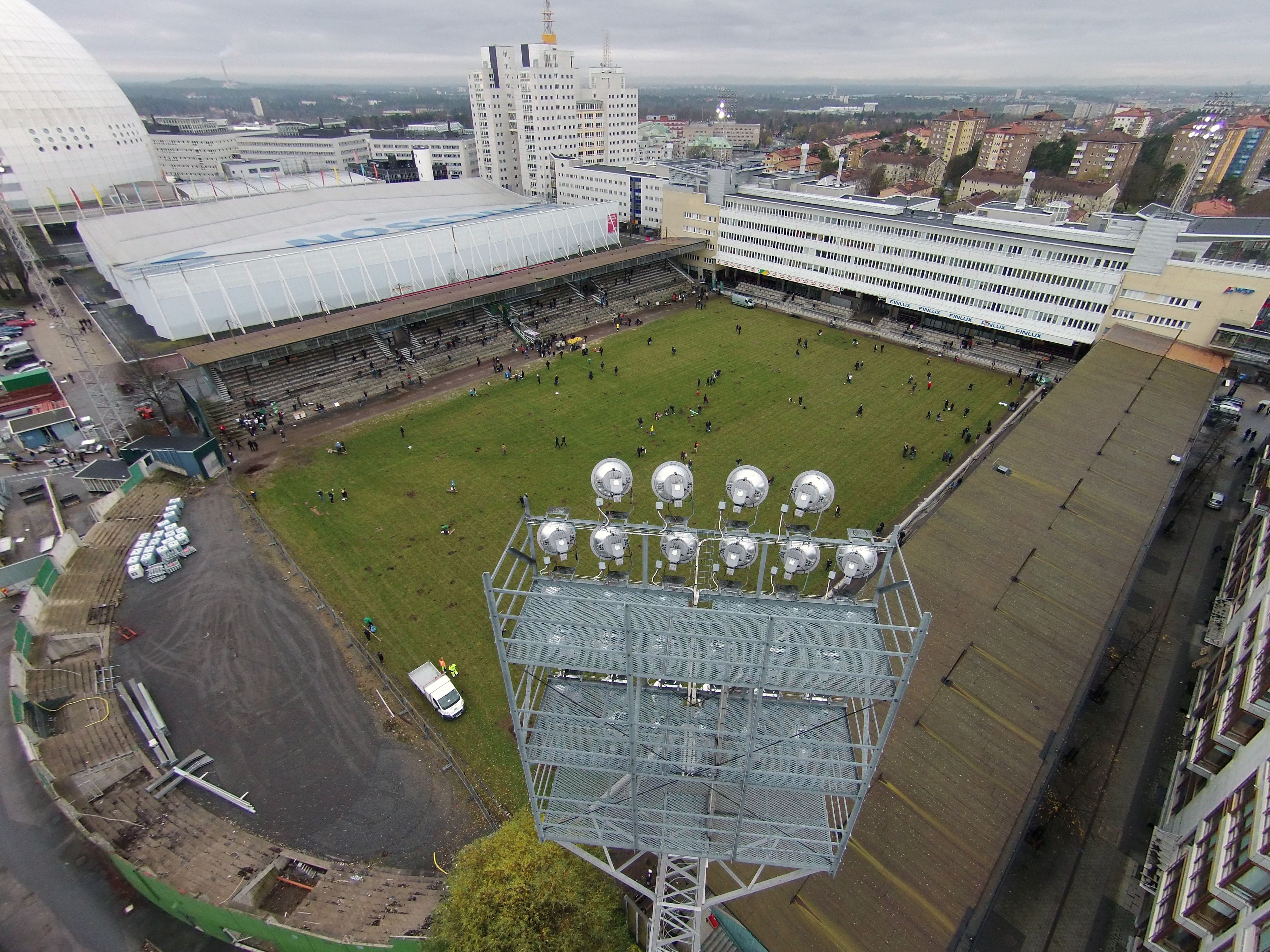 DCIM\100MEDIA